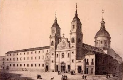 "Casa del Noviciado de la Compañía (entre 1860 y 1864)", de Eusebio de Lettre